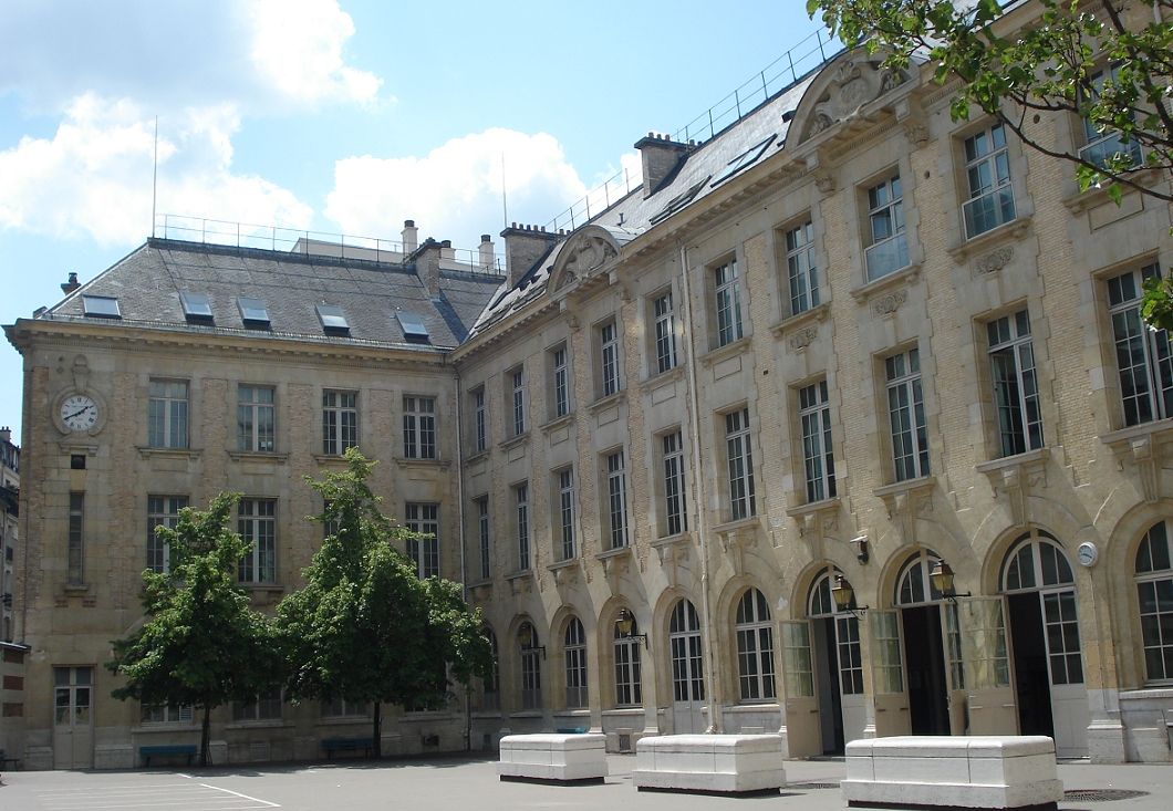 La cour intérieure du Lycée Lavoisier